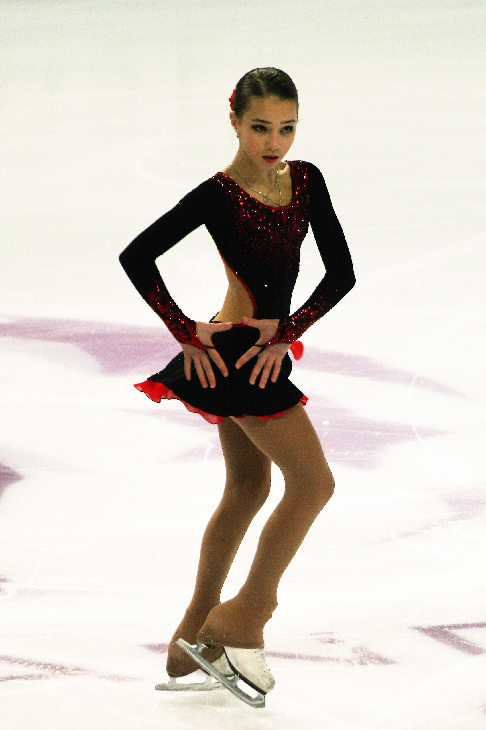 Елизавета Нугуманова (Россия) на финале Гран-при по фигурному катанию среди юниоров 2016-2017